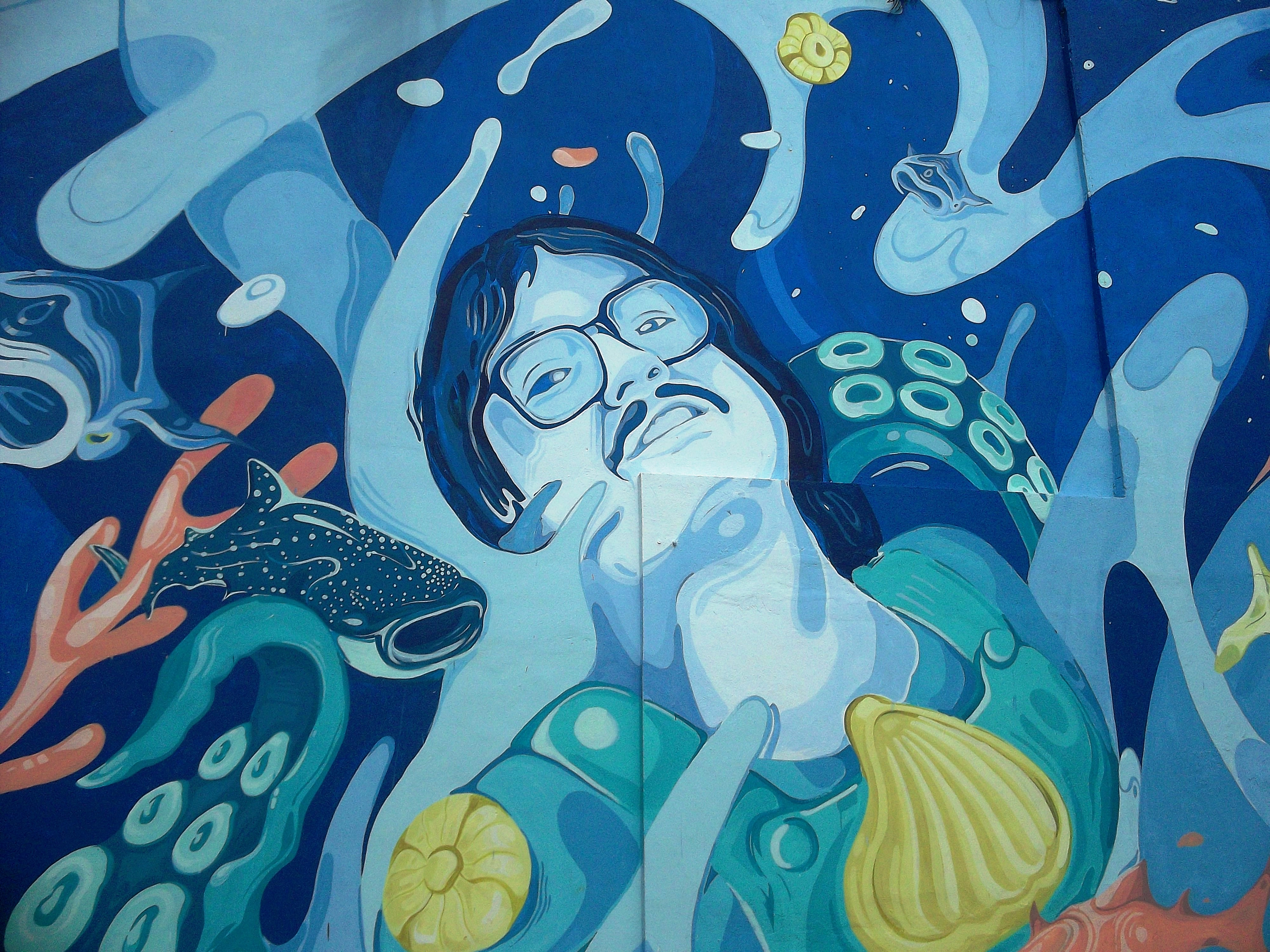 Mural de Chico Che en Mérida, Yucatán.